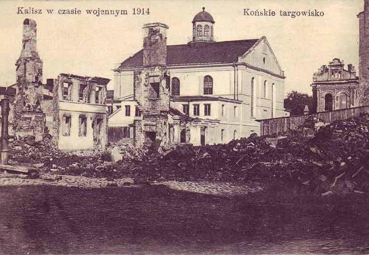 Kalisz, Wielka Synagoga, 1914